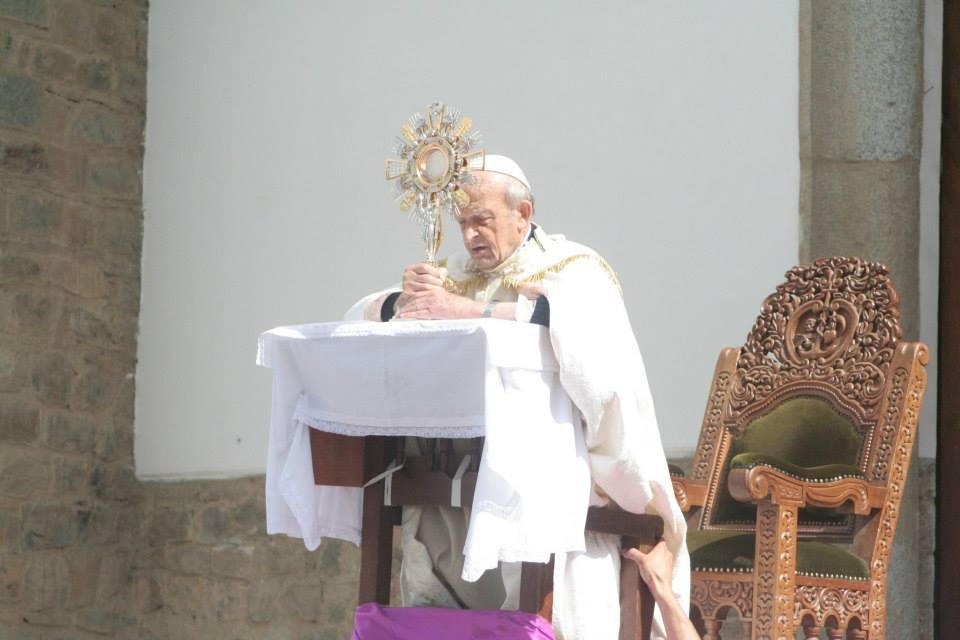 El padre Ugo en una de las últimas procesiones como párroco de Chacas, su estado de salud obligó a que los pobladores chacasinos le prepararan un anda sobre el cual celebraria las procesiones.